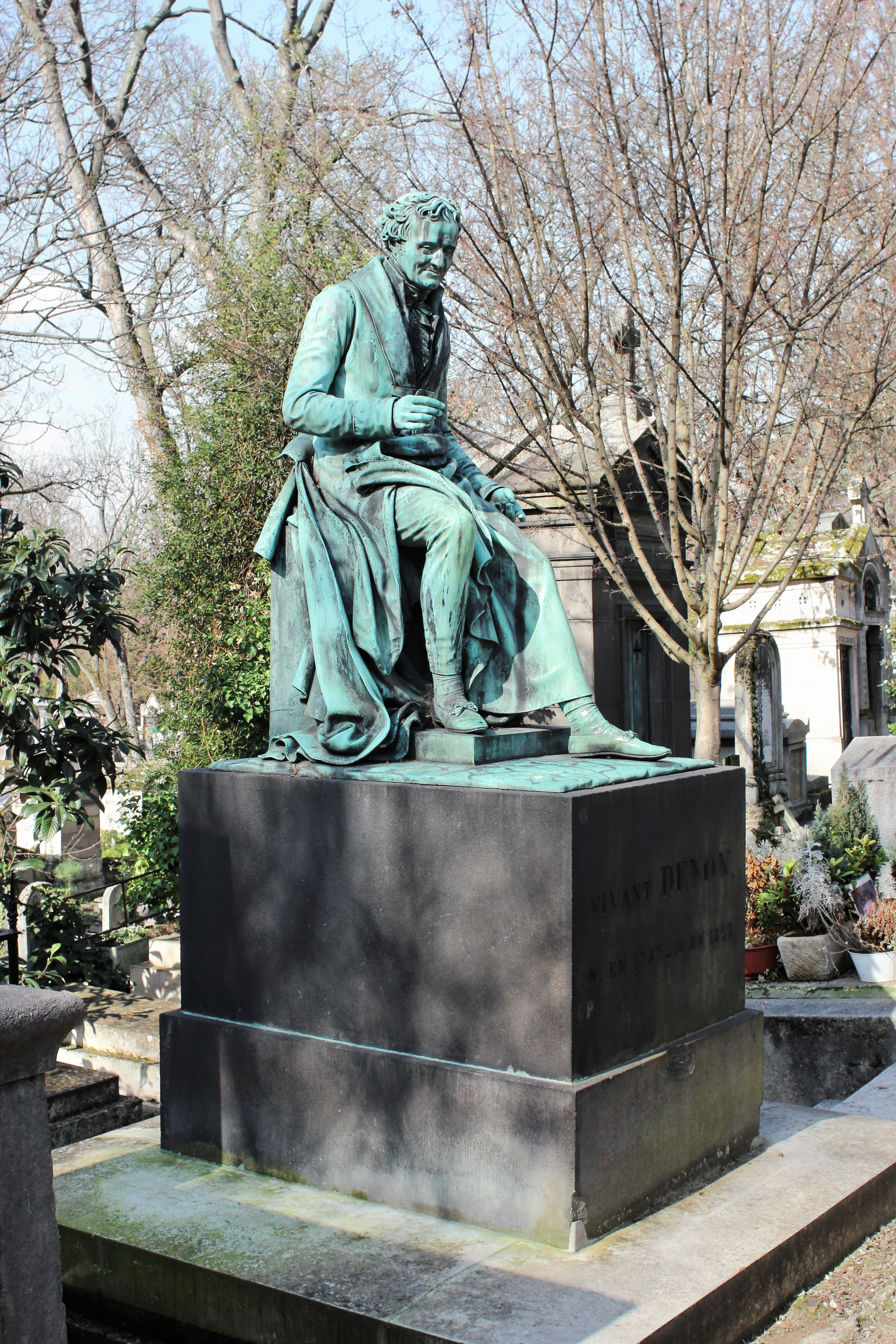 Sépulture de Dominique Vivant Denon (1747-1825), graveur, écrivain, diplomate et administrateur. Statue en bronze d'un homme assis représentant Denon. À l'origine la statue tenait un crayon dans sa main droite.